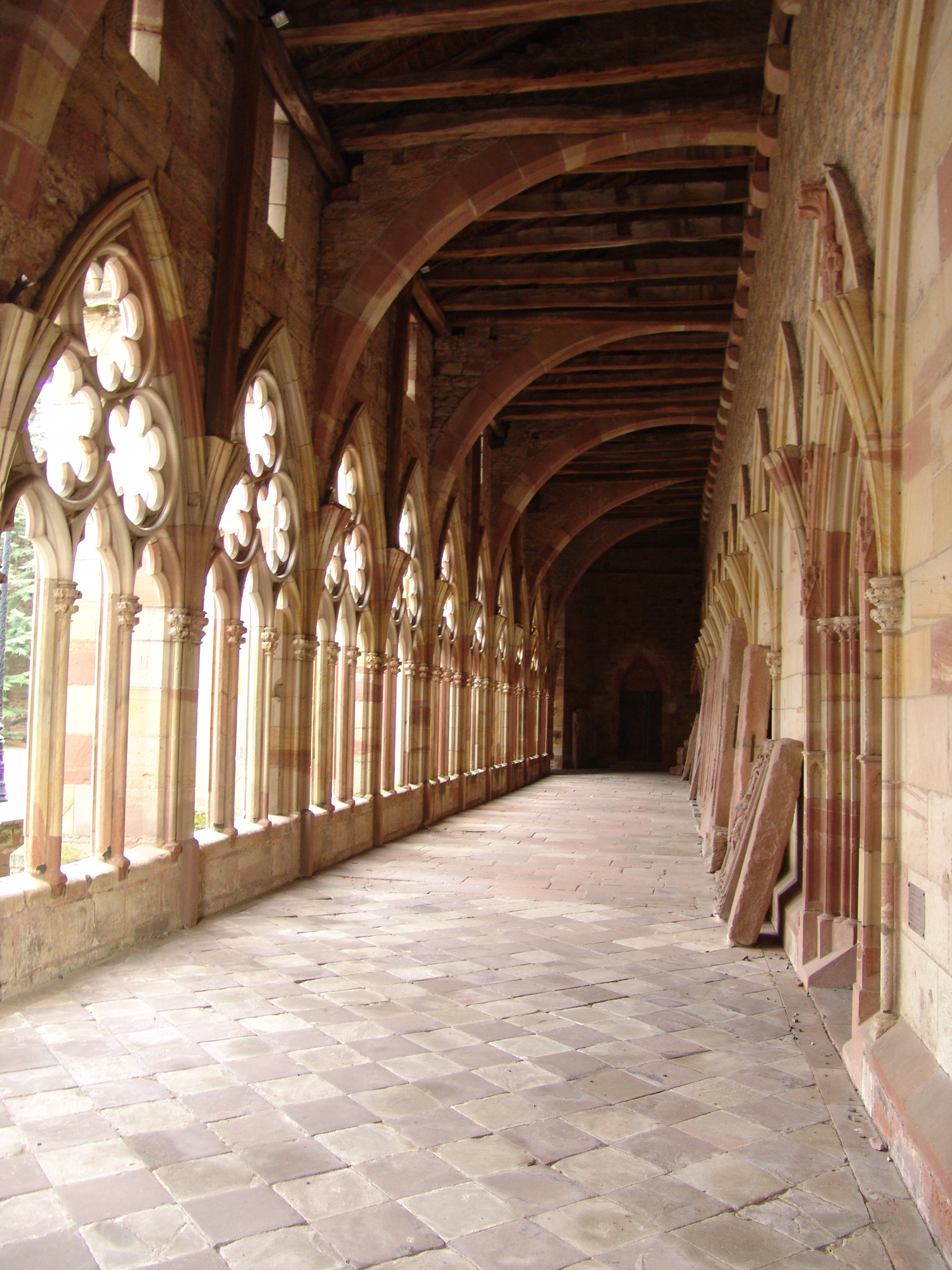 Abbatiale Saint-Pierre-et-Saint-Pauléglise